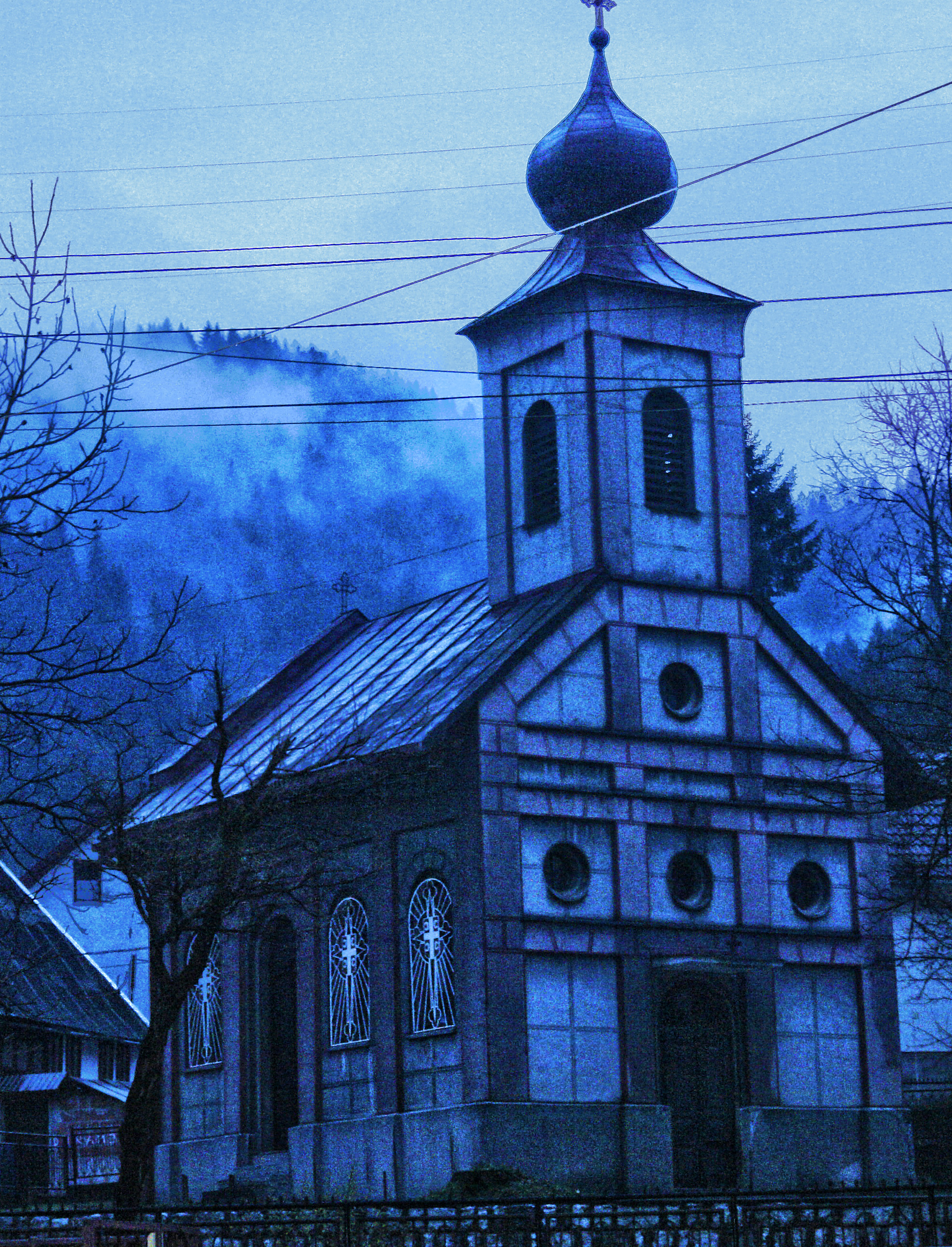 Pravoslavna crkva